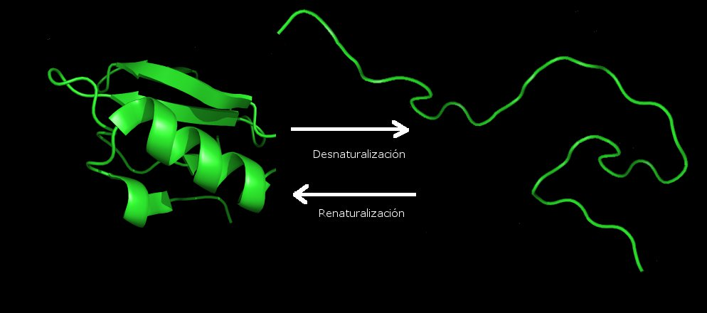 Desnaturalización y renaturalización de una cadena polipeptídica